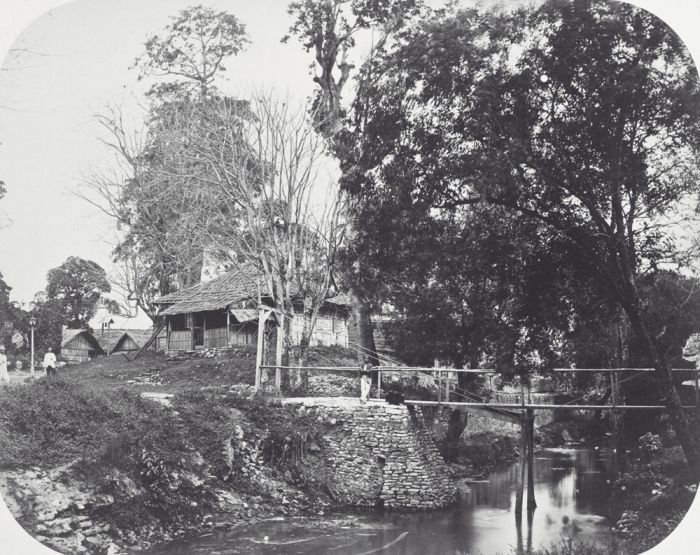 foto. Huis eerst bewoond door Generaal Pel, Atjeh